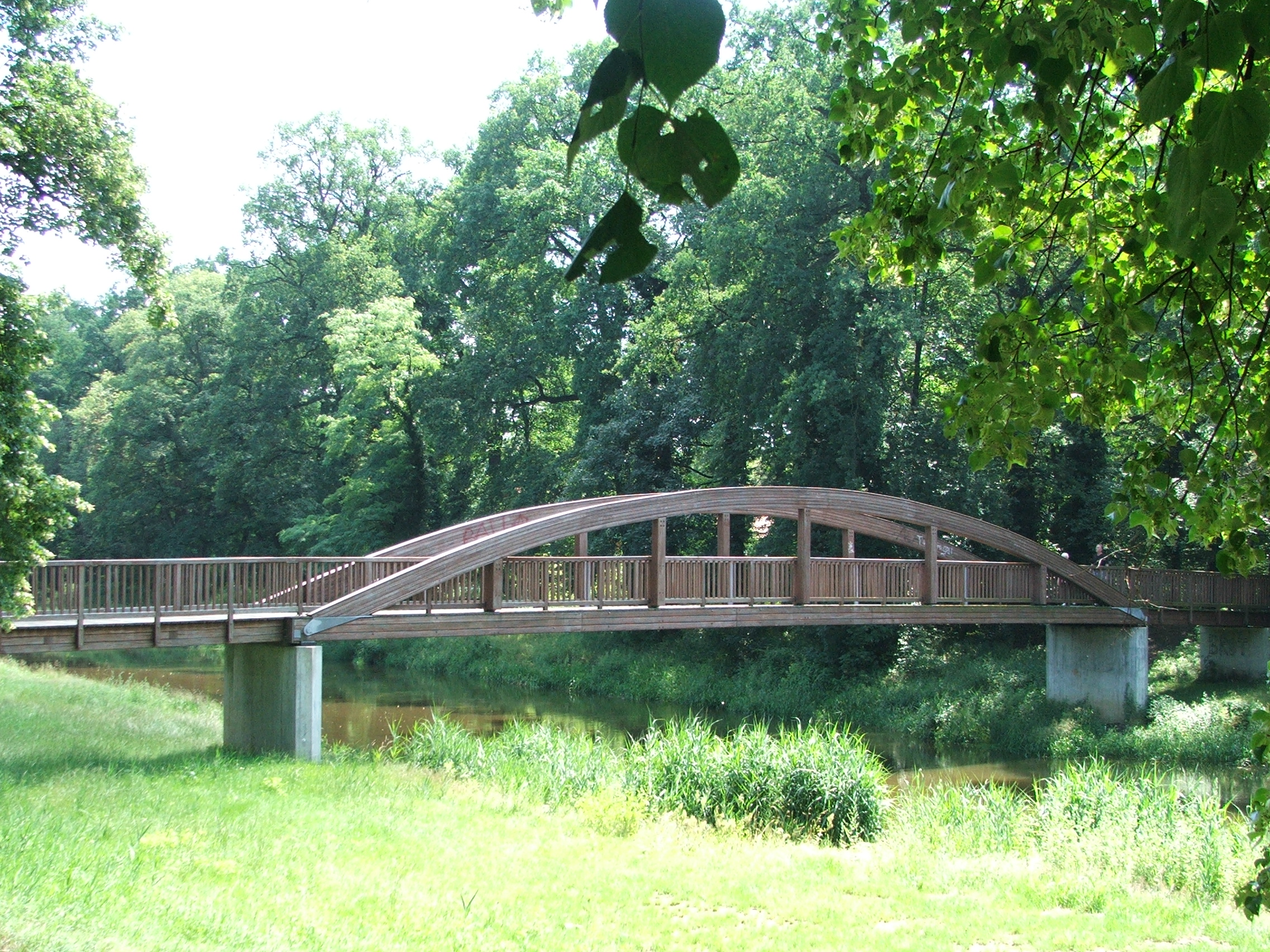 Wäldchen-Brigde over the "Schwarze Elster" river